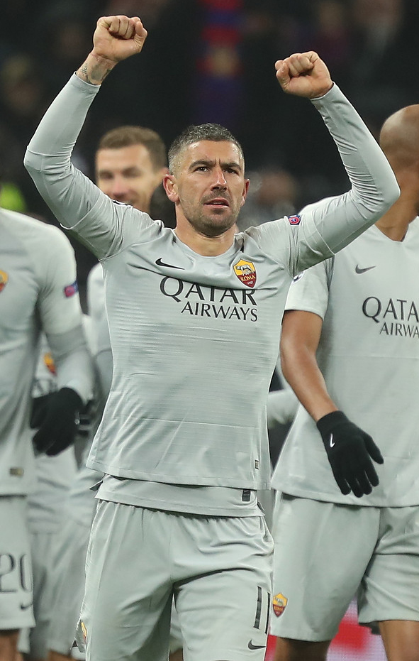 ЦСКА проиграл «Роме» в «Лужниках»